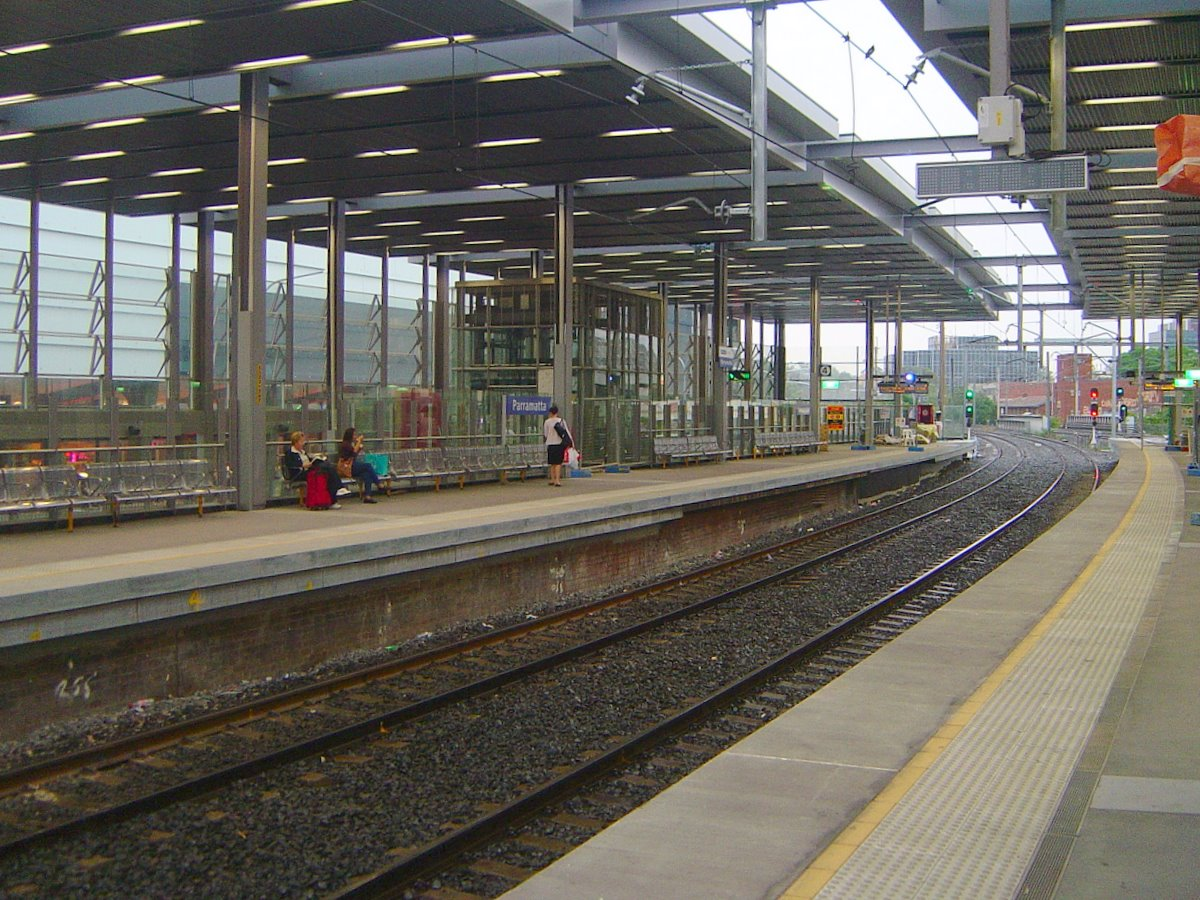 Parramatta Station